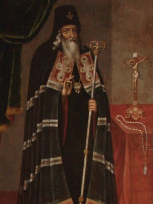 Беларуская (тарашкевіца): Партрэт Мялеція Храптовіча (Mialeci Chraptovič)